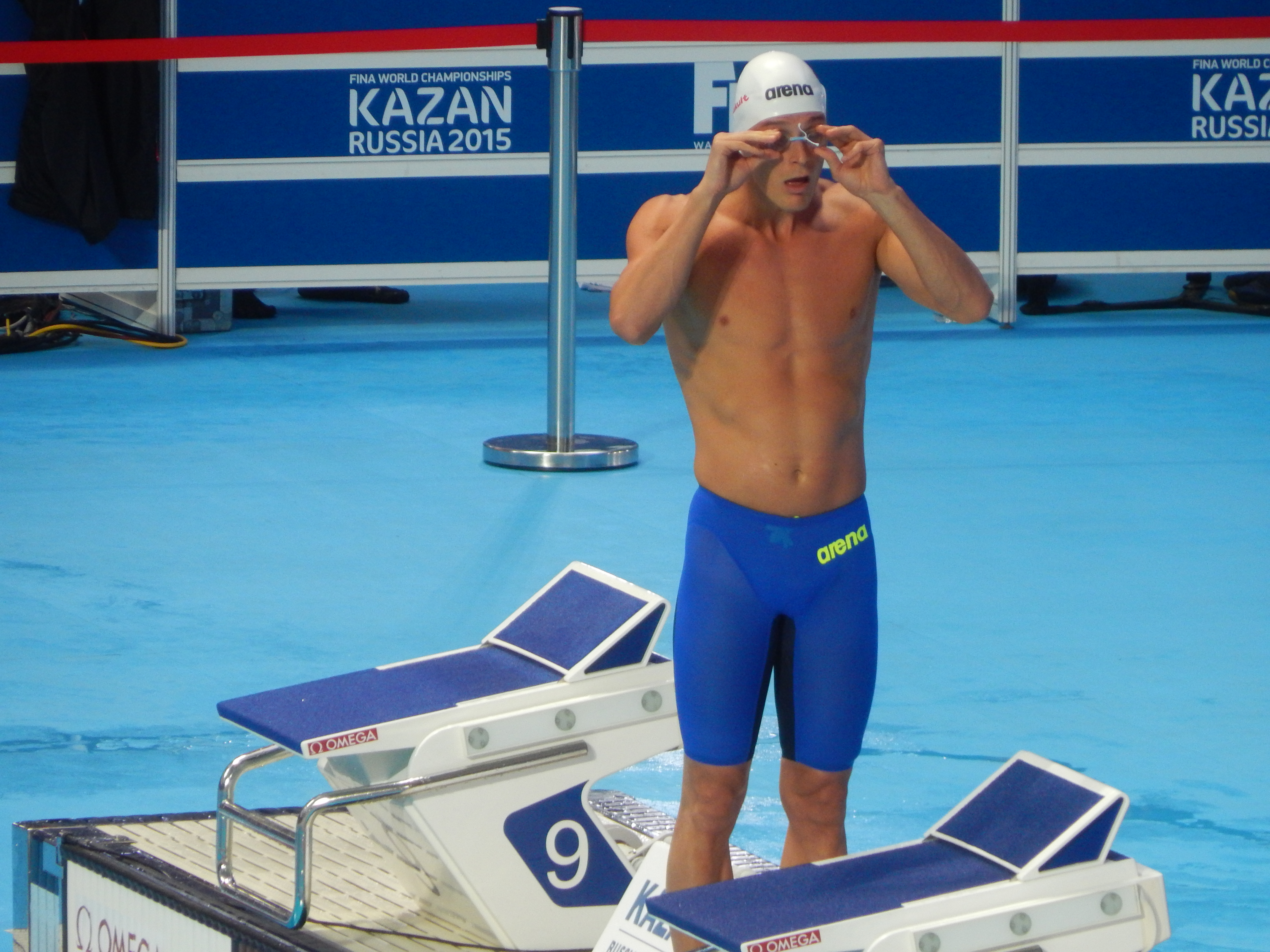 Павел Корженёвский в Казани на чемпионате мира, финал 100-метровки баттерфляем